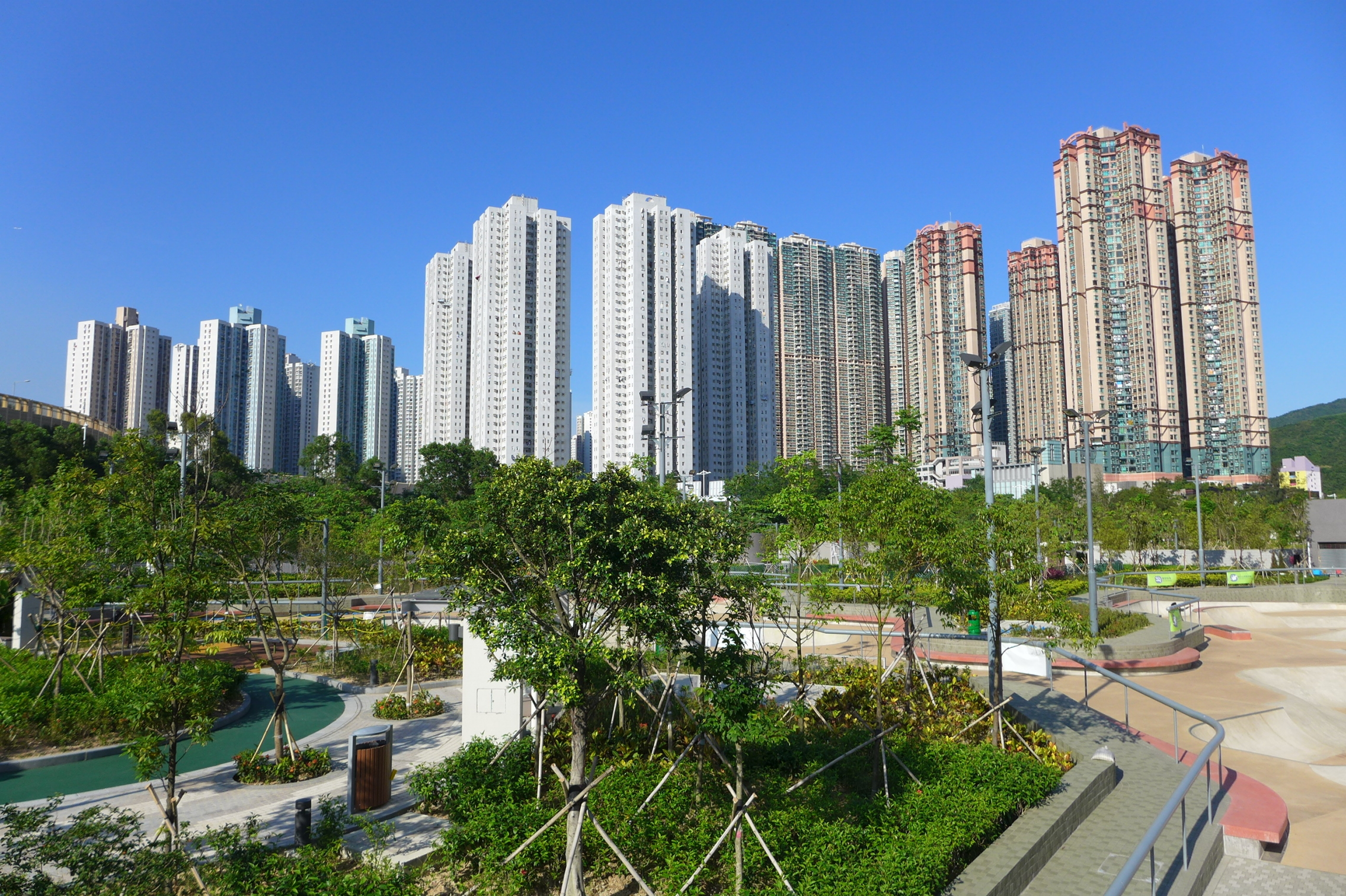 Hang Hau 坑口